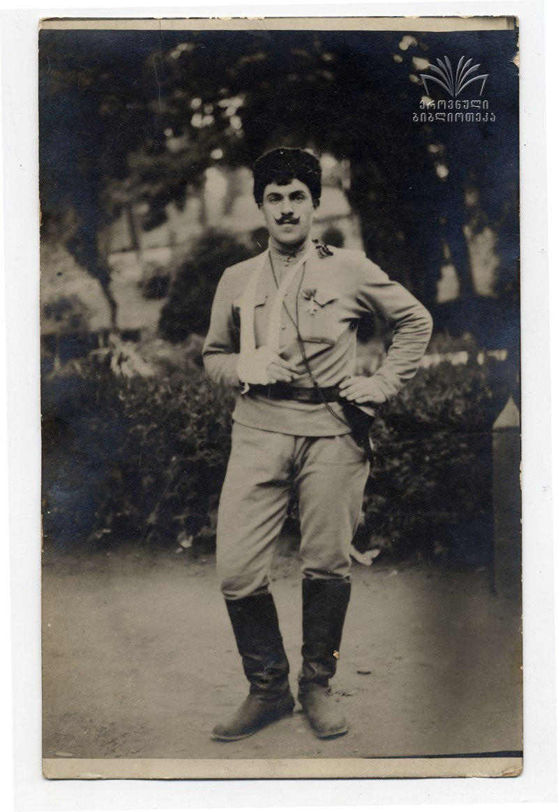 პორფილე გორგოშიძე